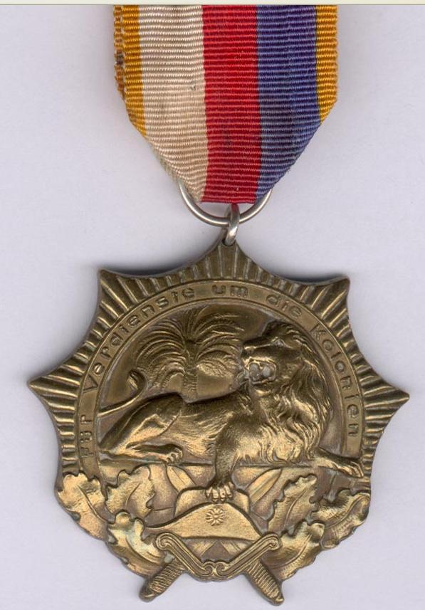 Löwenorden Bronzestufe am Band